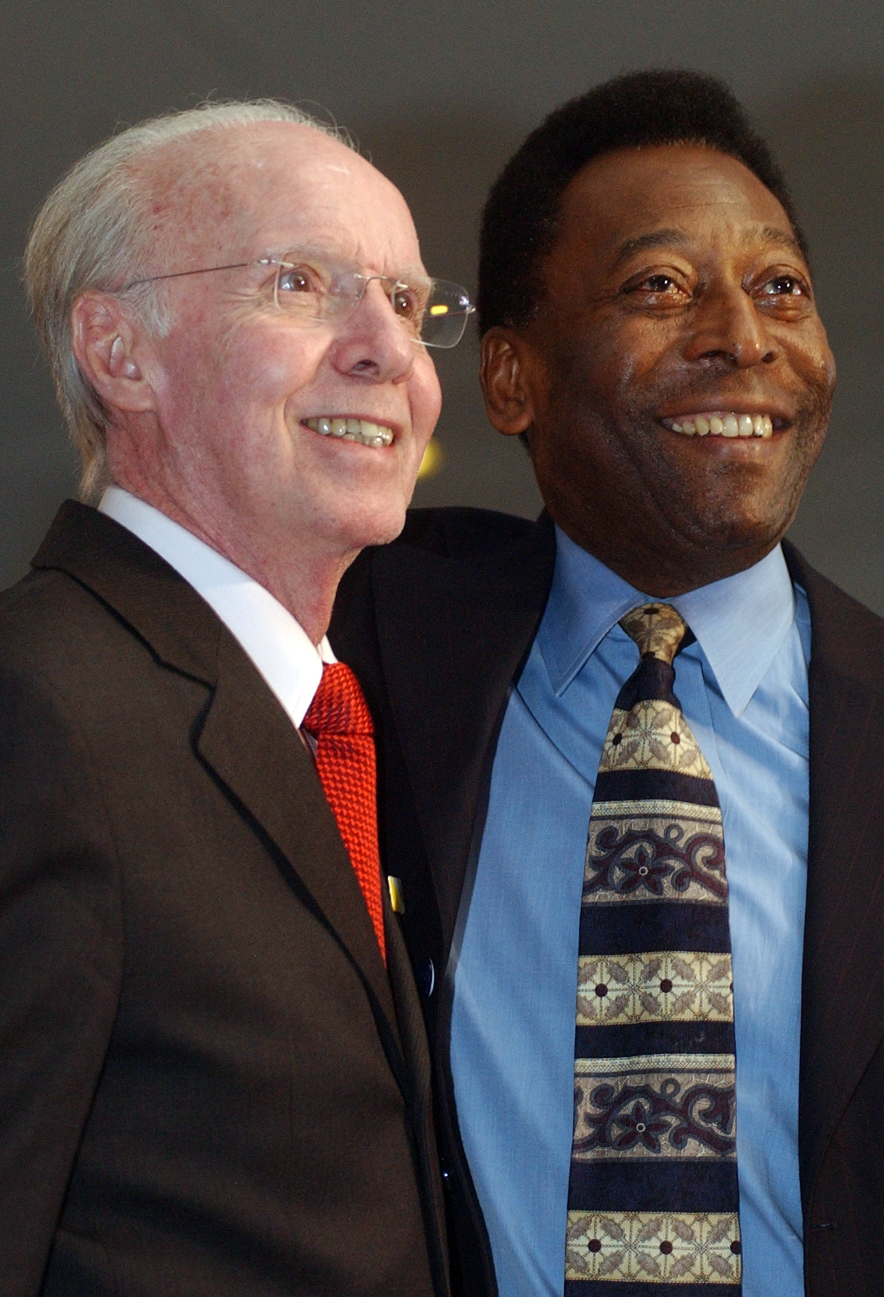 Brasília - Pelé e Zagallo posam para foto durante inauguração de exposição em homenagem aos 50 anos da conquista da primeira Copa do Mundo pelo Brasil